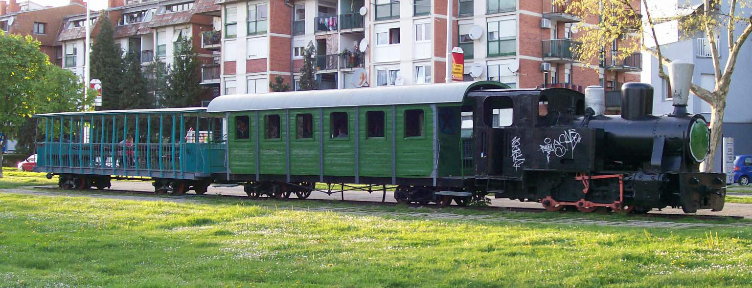 Spomenik Samoborčeku u Samoboru